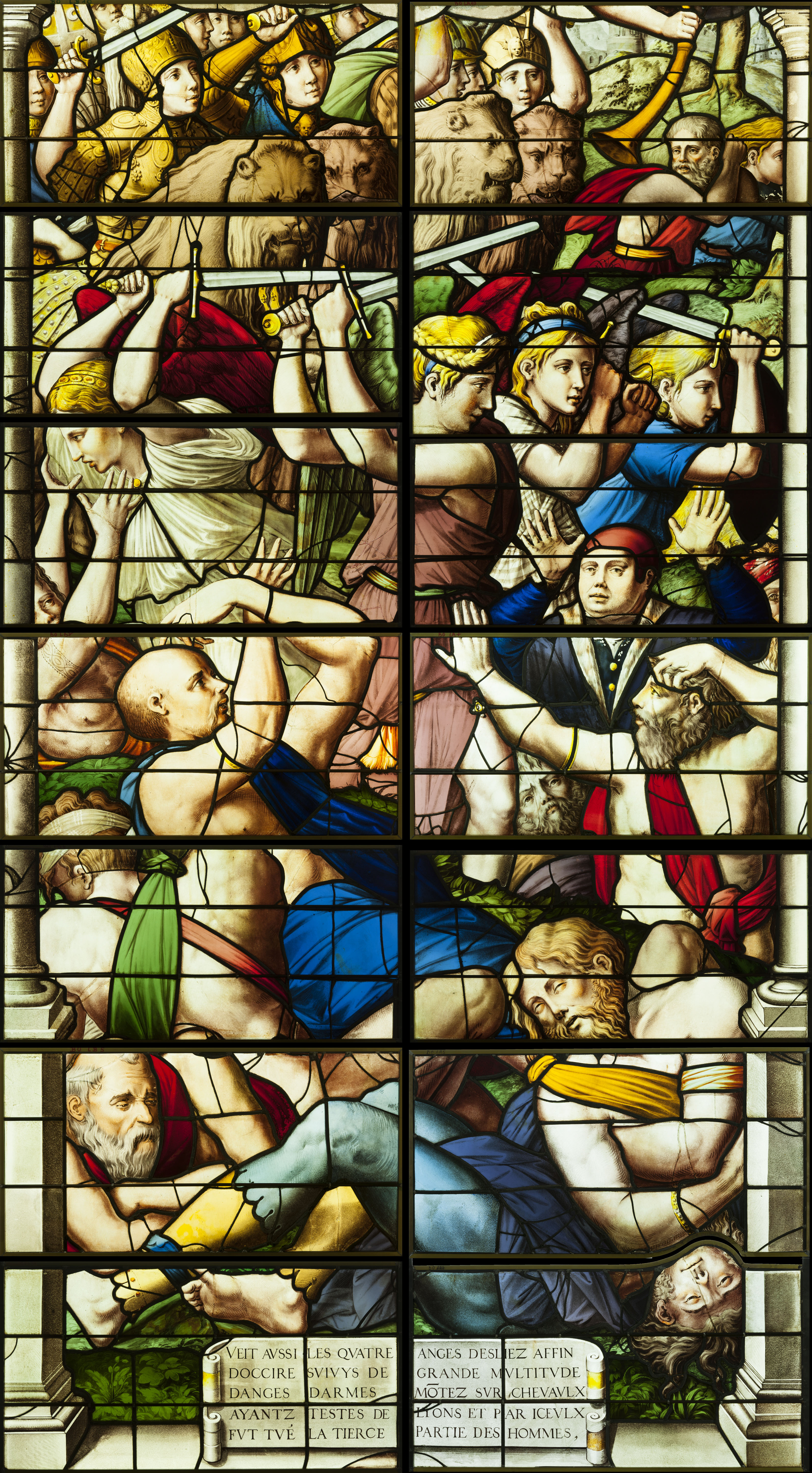 Montage présentant une partie du registre inférieur de la verrière centrale (baie 0) de l'abside.